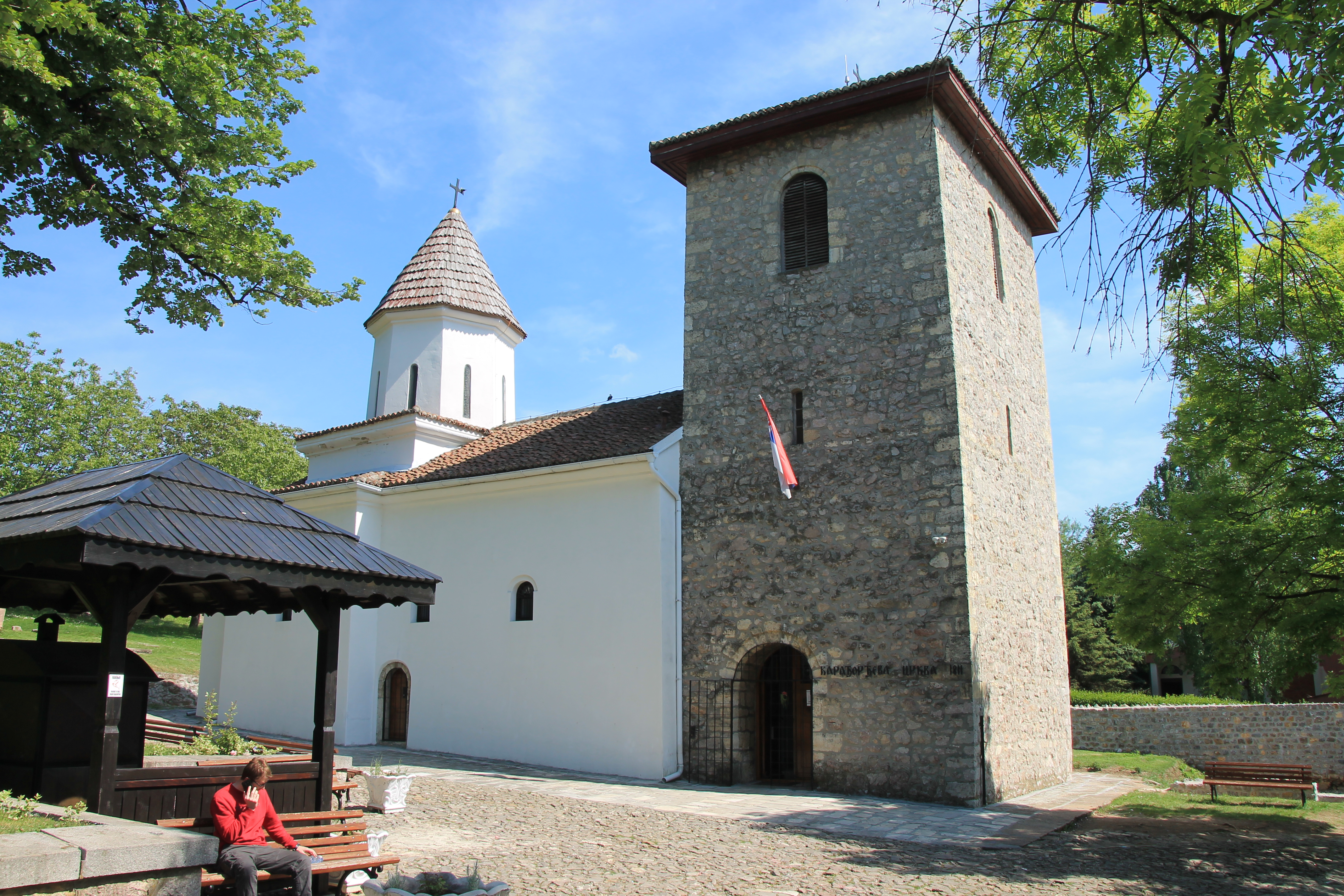 Karadjordjeva crkva (Topola)